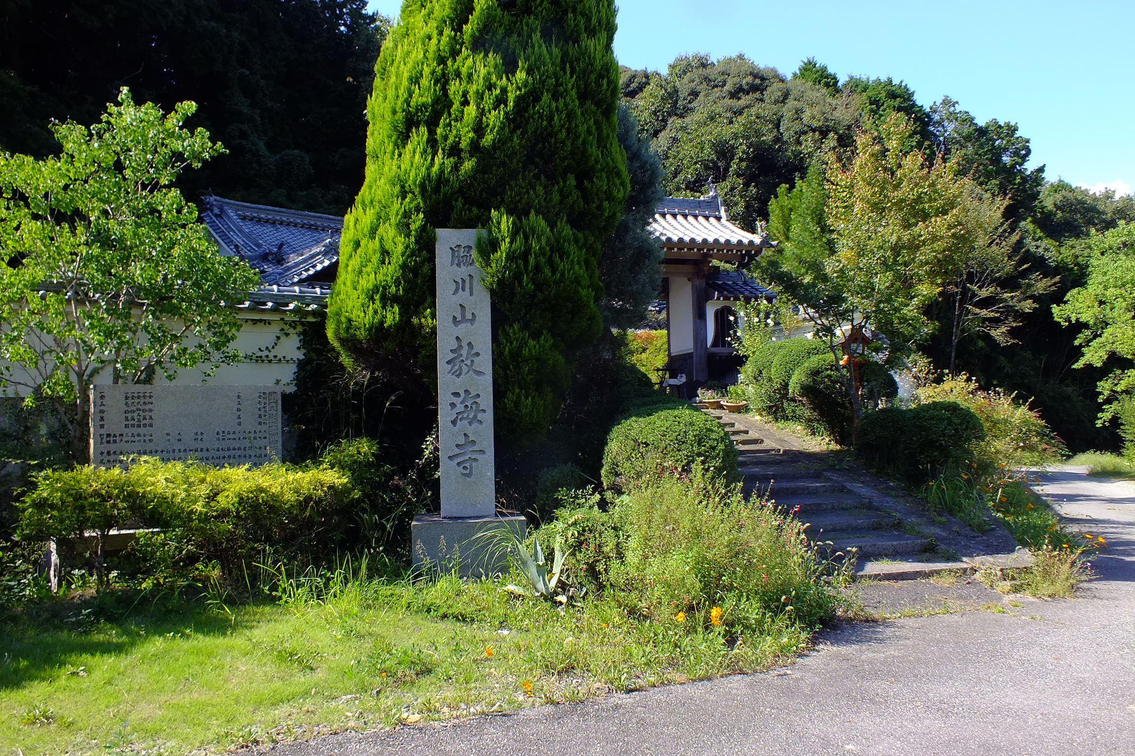 Wakikawa-san Kyokaiji temple(脇川山教海寺) 兵庫県三木市細川町脇川